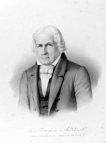 Jose Bonifácio de Andrada e Silva